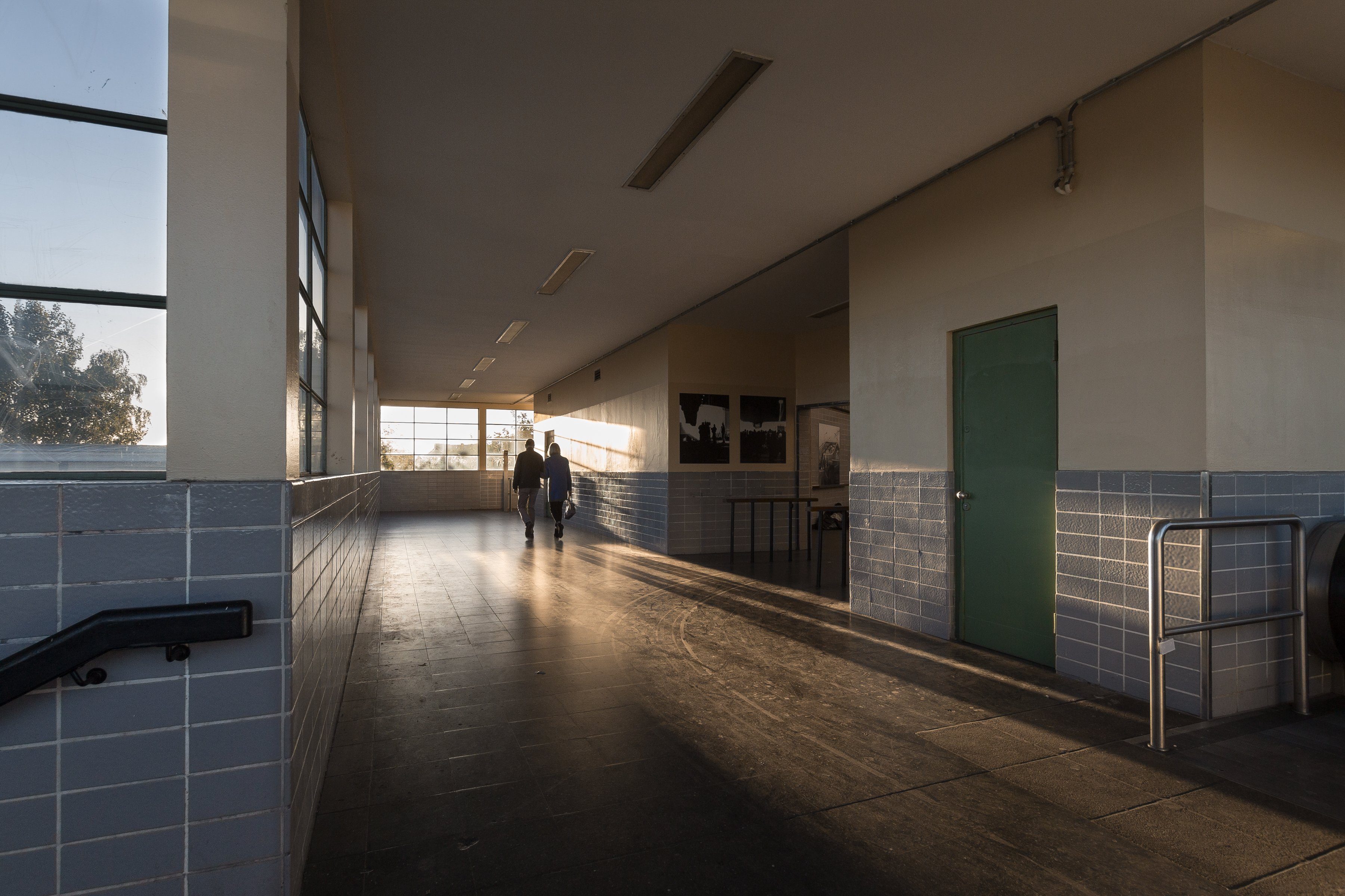 Innenansicht der S-Bahnstation Bornholmer Straße mit PassantenThis is a photograph of an architectural monument.